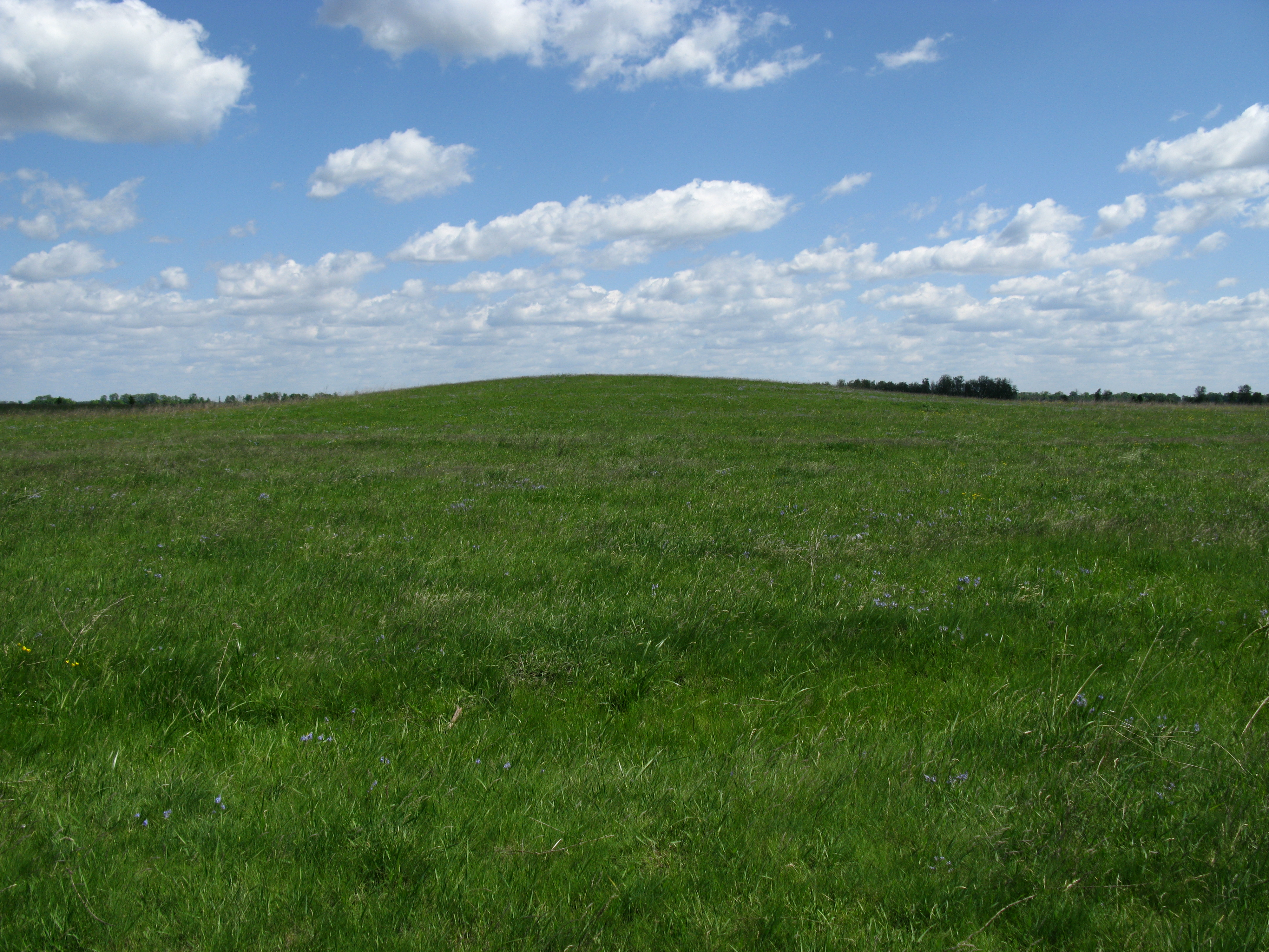 Скіфський курган біля с.Богданівка